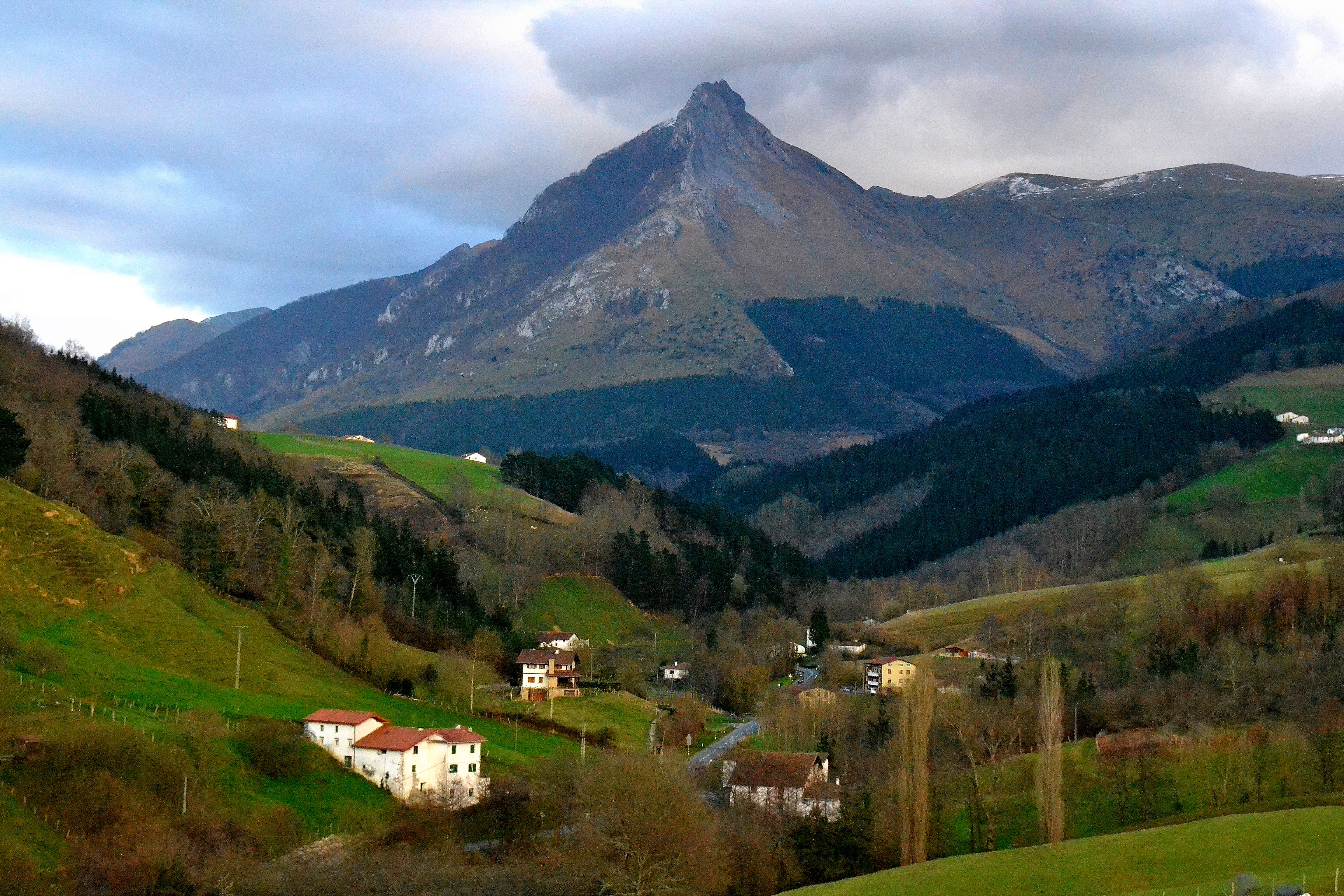 Txindoki mendiaren ikuspegia Zaldibiatik ikusita. Gipuzkoa, euskal Herria. View of Txindoki mountain from Zaldibia village. Gipuzkoa, Basque Country.